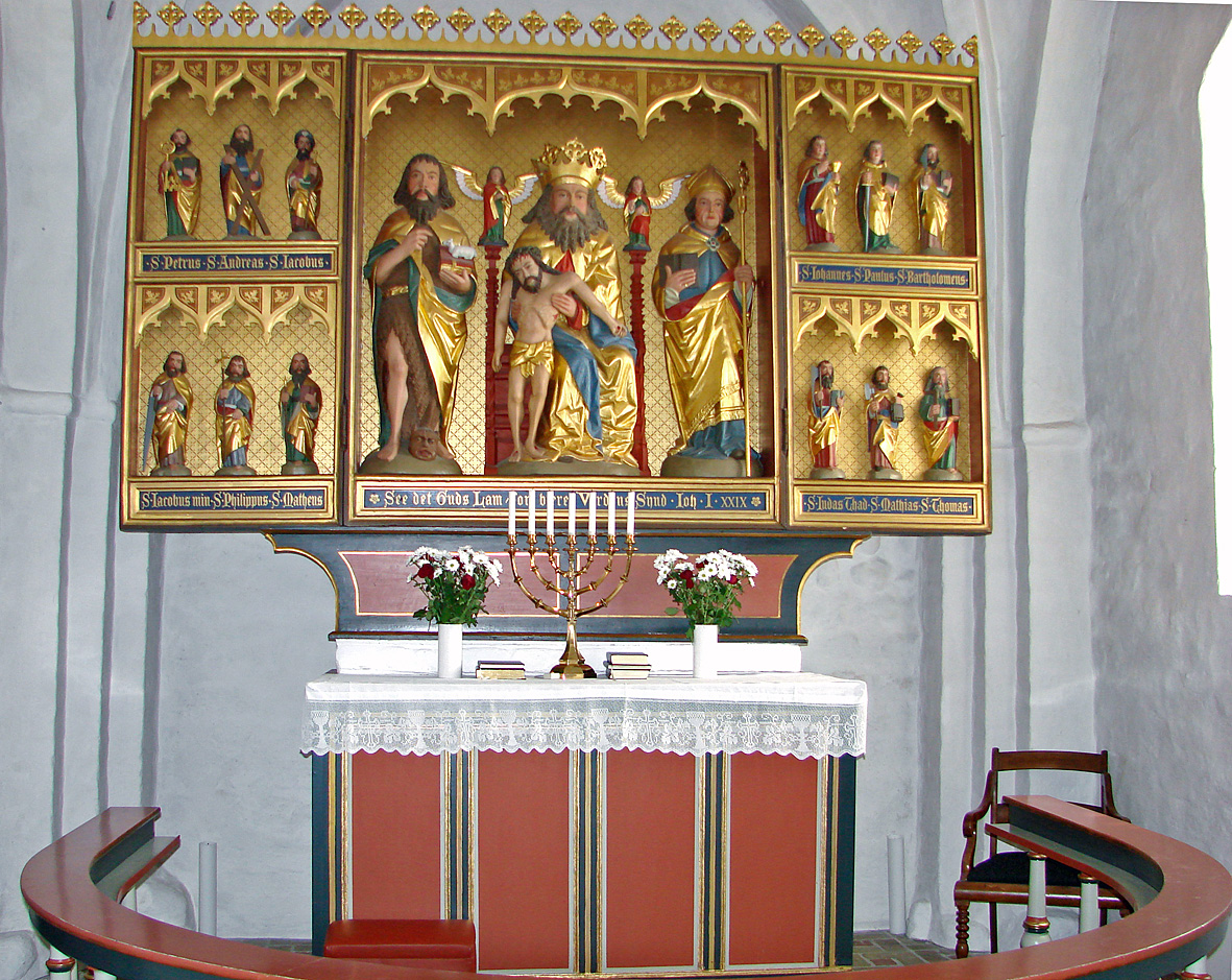 Altertavle Malling Kirke Jylland, Denmark